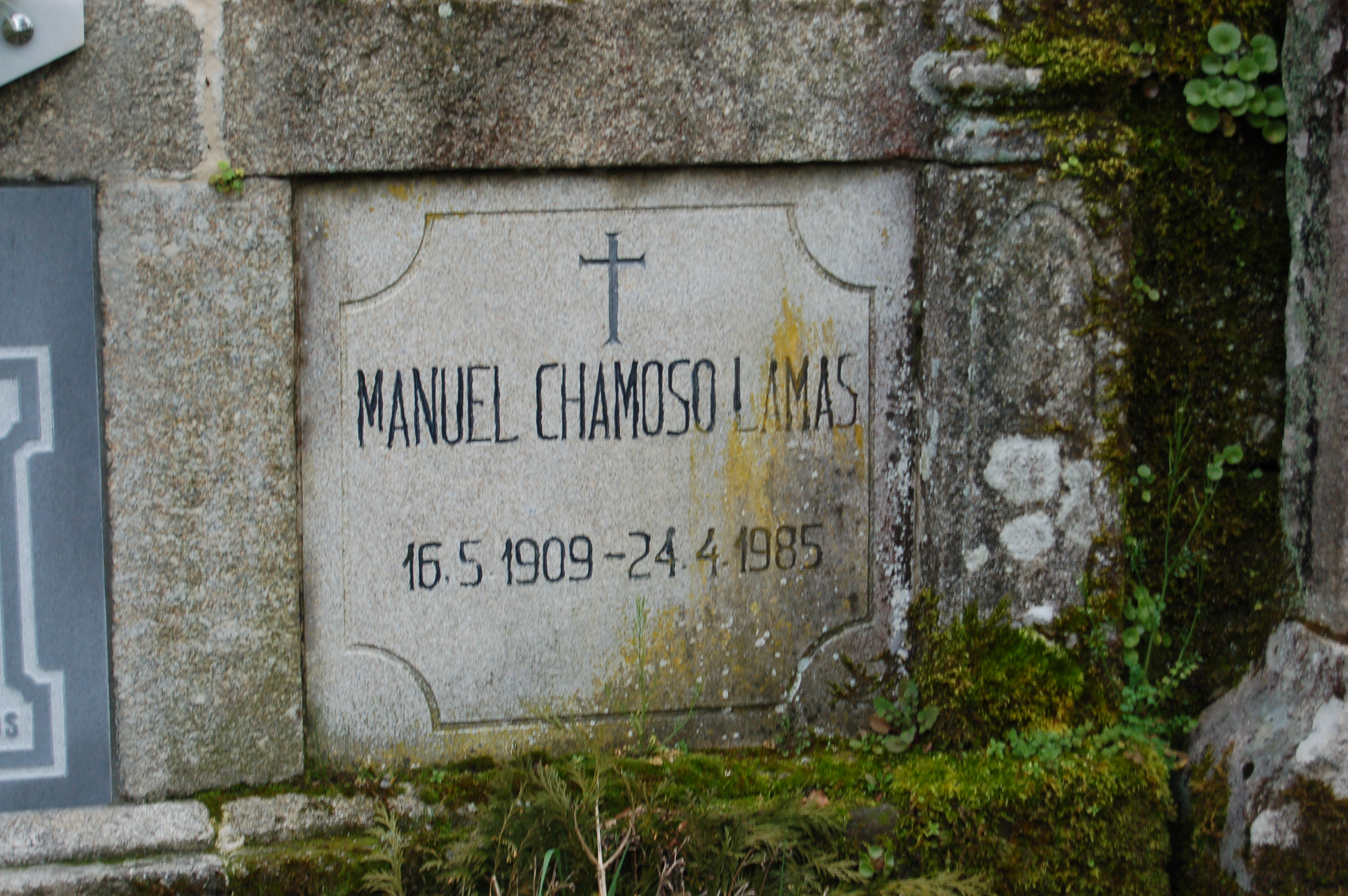 Tumba de Manuel Chamoso Lamas en Moldes (Boborás)